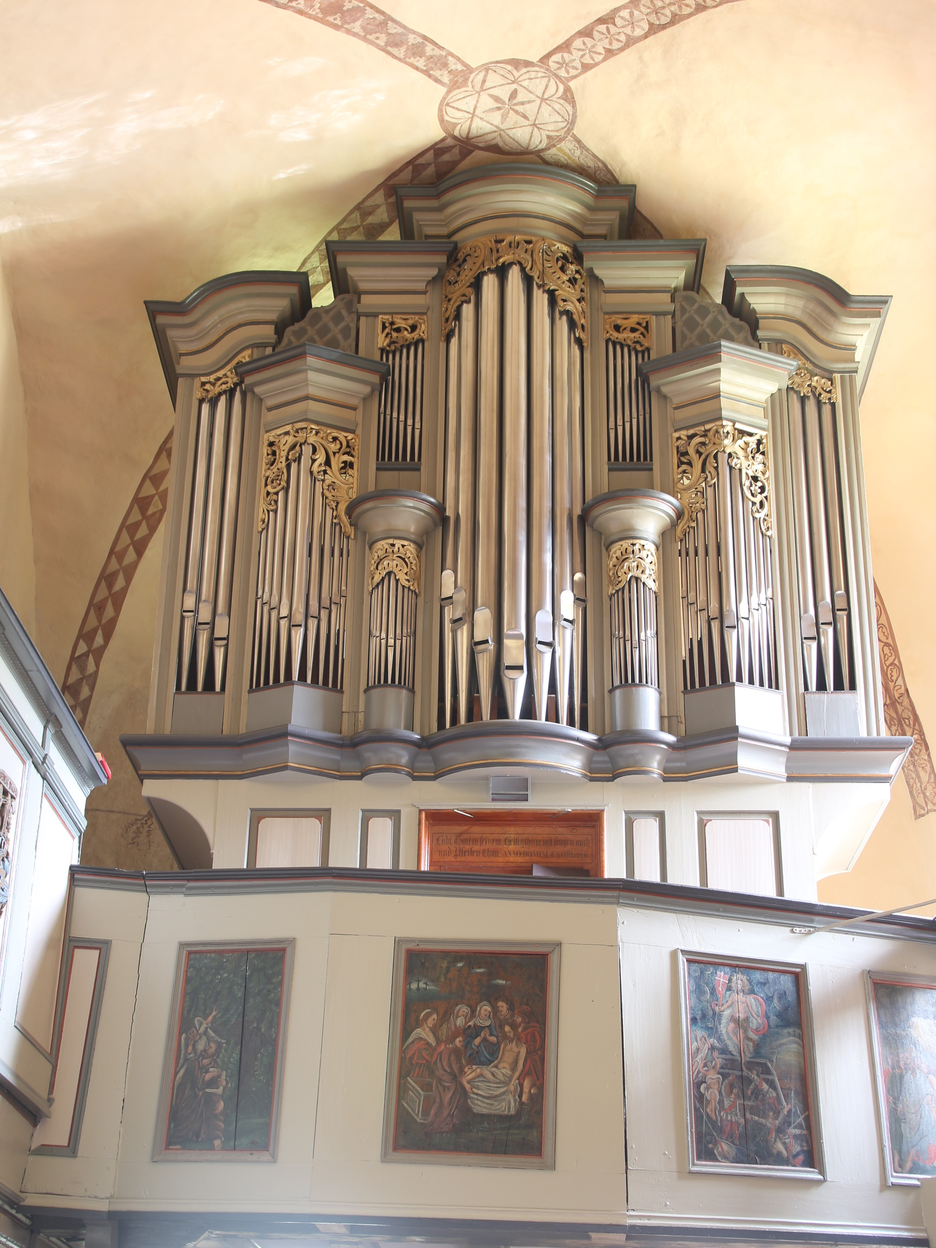 Evangelische Kirche Breidenbach, Landkreis Marburg-Biedenkopf, Hessen